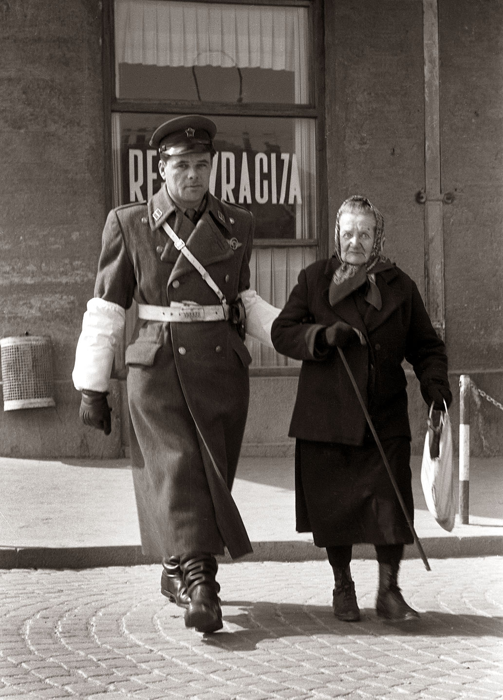 Prometni miličnik pomaga starejši ženici varno čez cesto